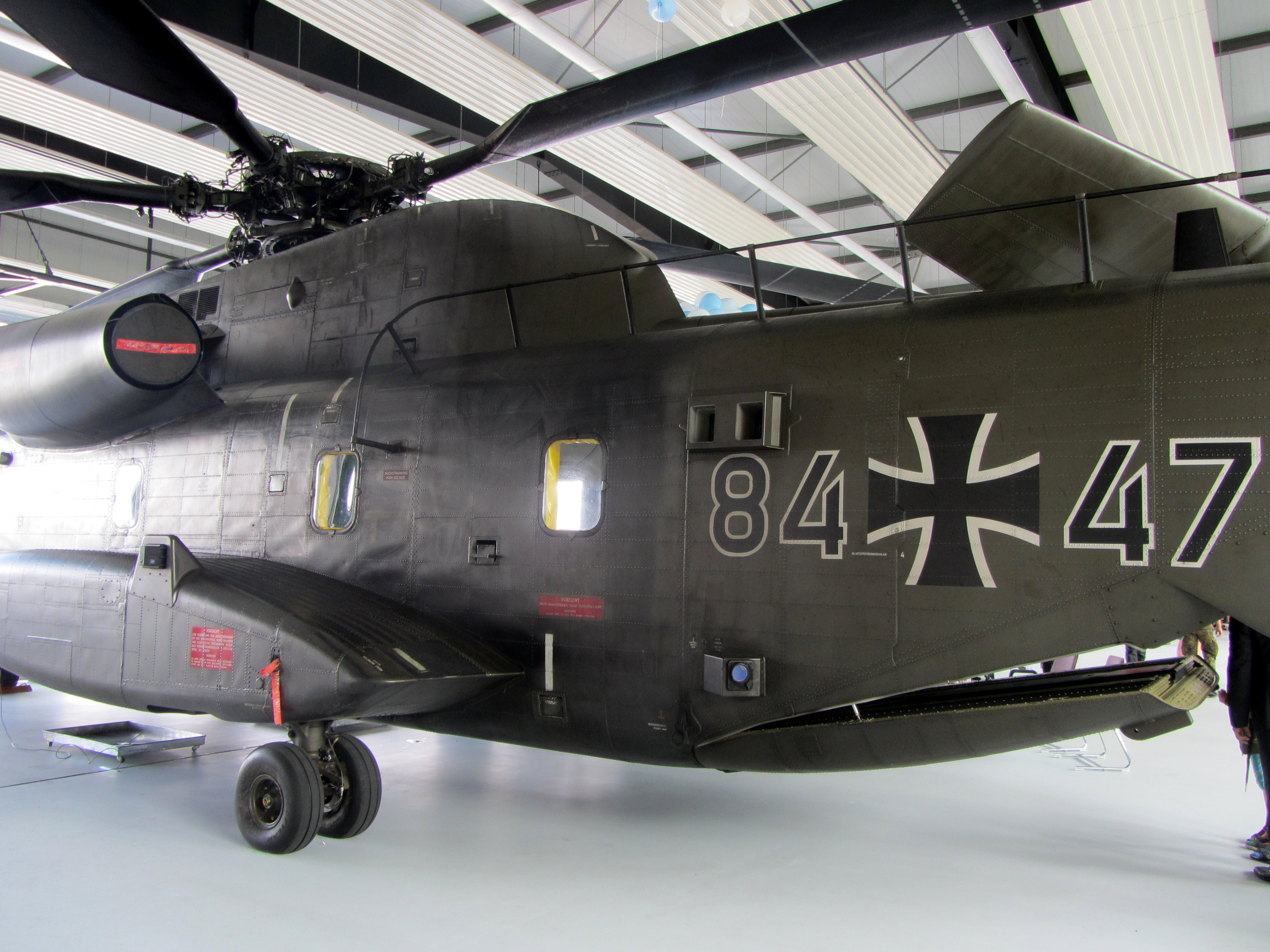 Tag der Bundeswehr 2015 (Militärflugplatz Laupheim)